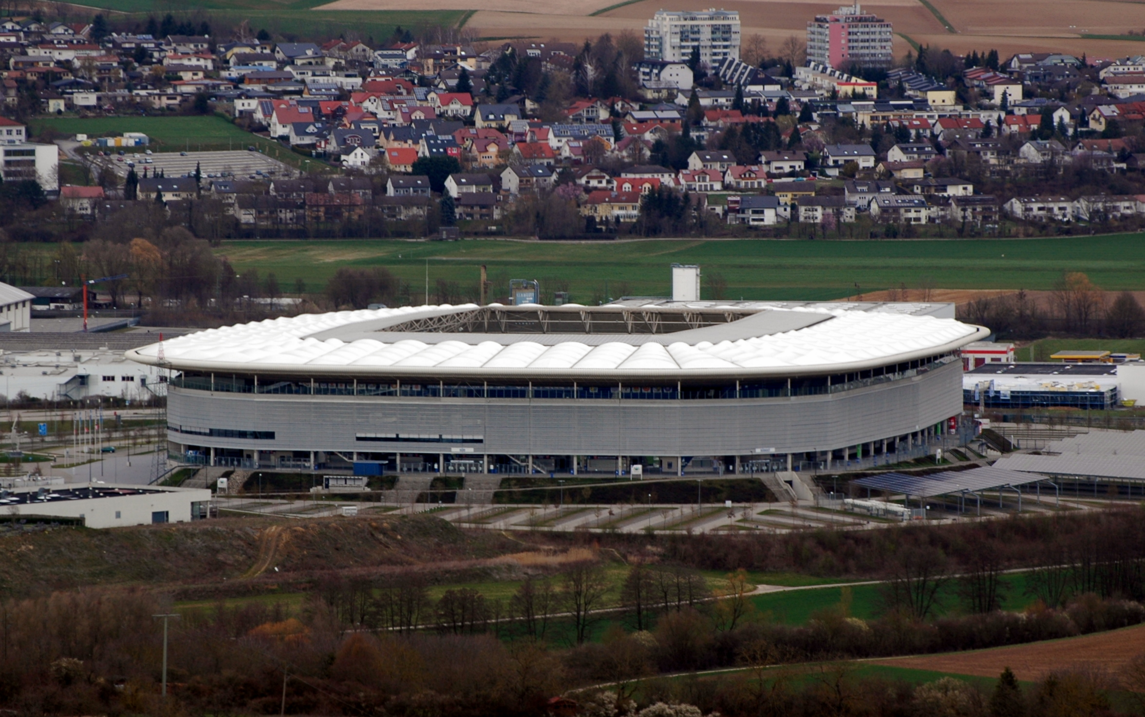 Rhein-Neckar-Arena in Sinsheim. Blick von der Burg Steinsberg.